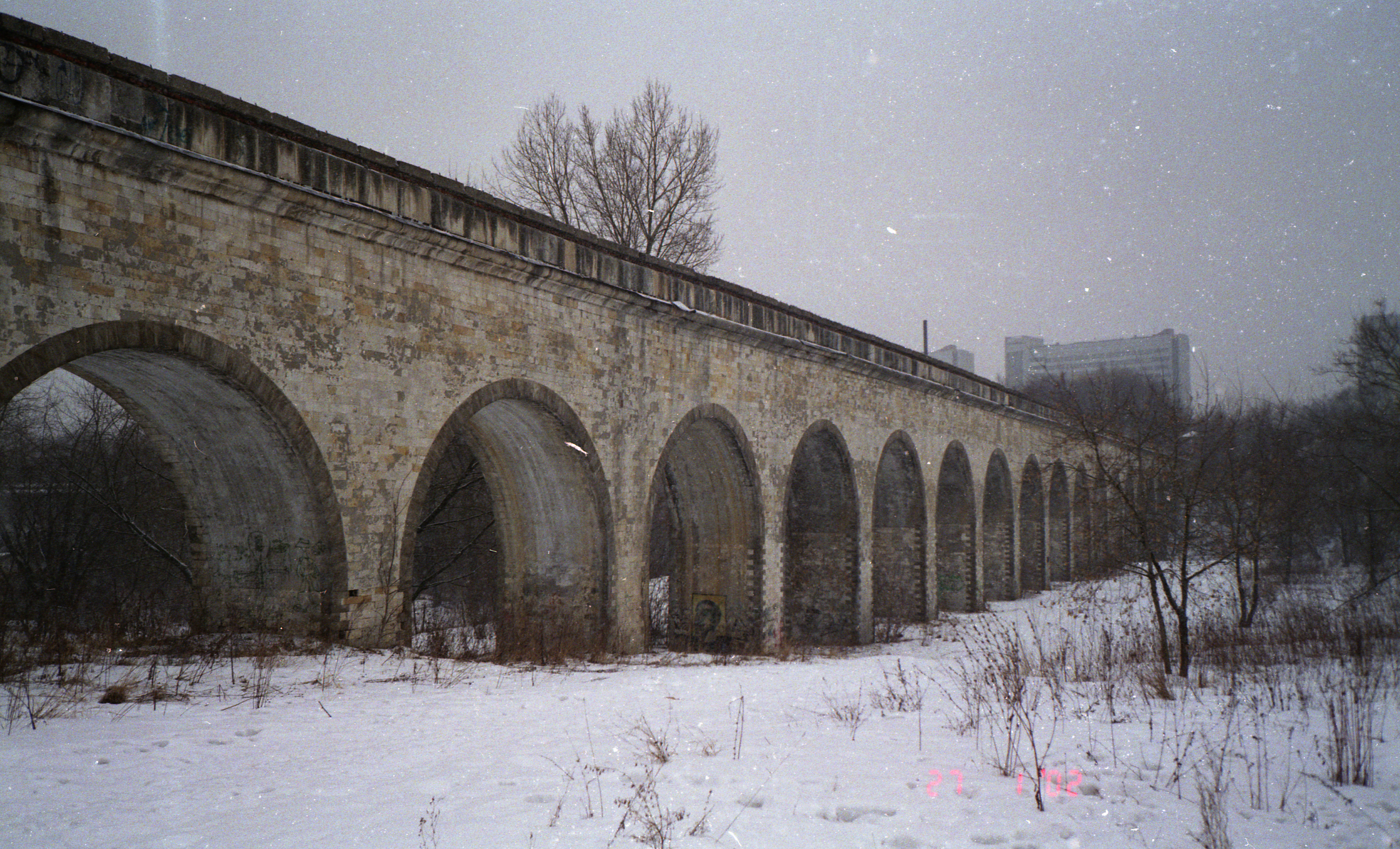 Olympus mju-II camera, Konica 200